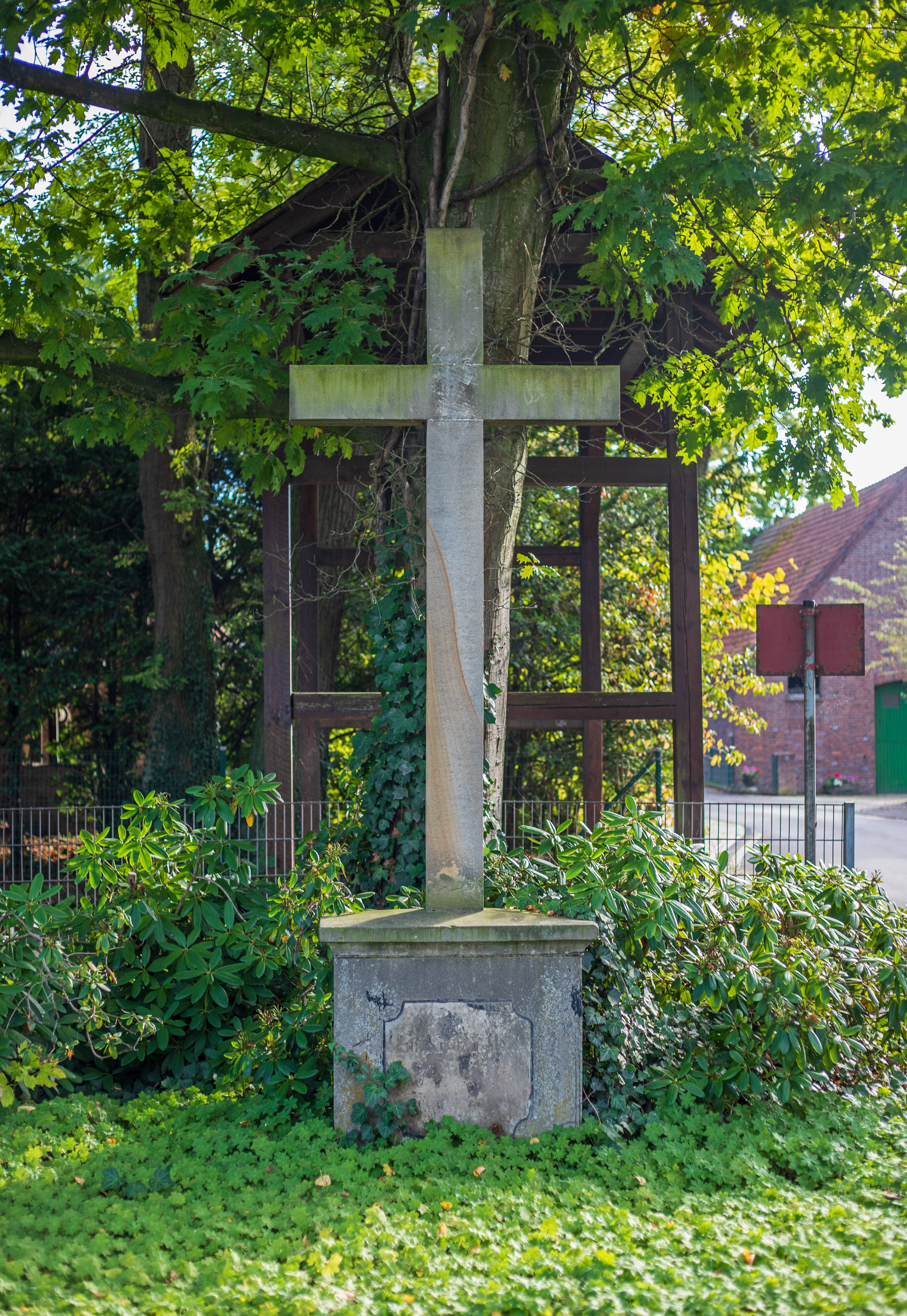 Gedenkkreuz aus Sandstein, errichtet 1893 von Familie Halfmann, an der Ecke Langenbochumerstraße/Recklinghäuser Straße in Steinernkreuz - Marl, Nordrhein-Westfalen, Deutschland